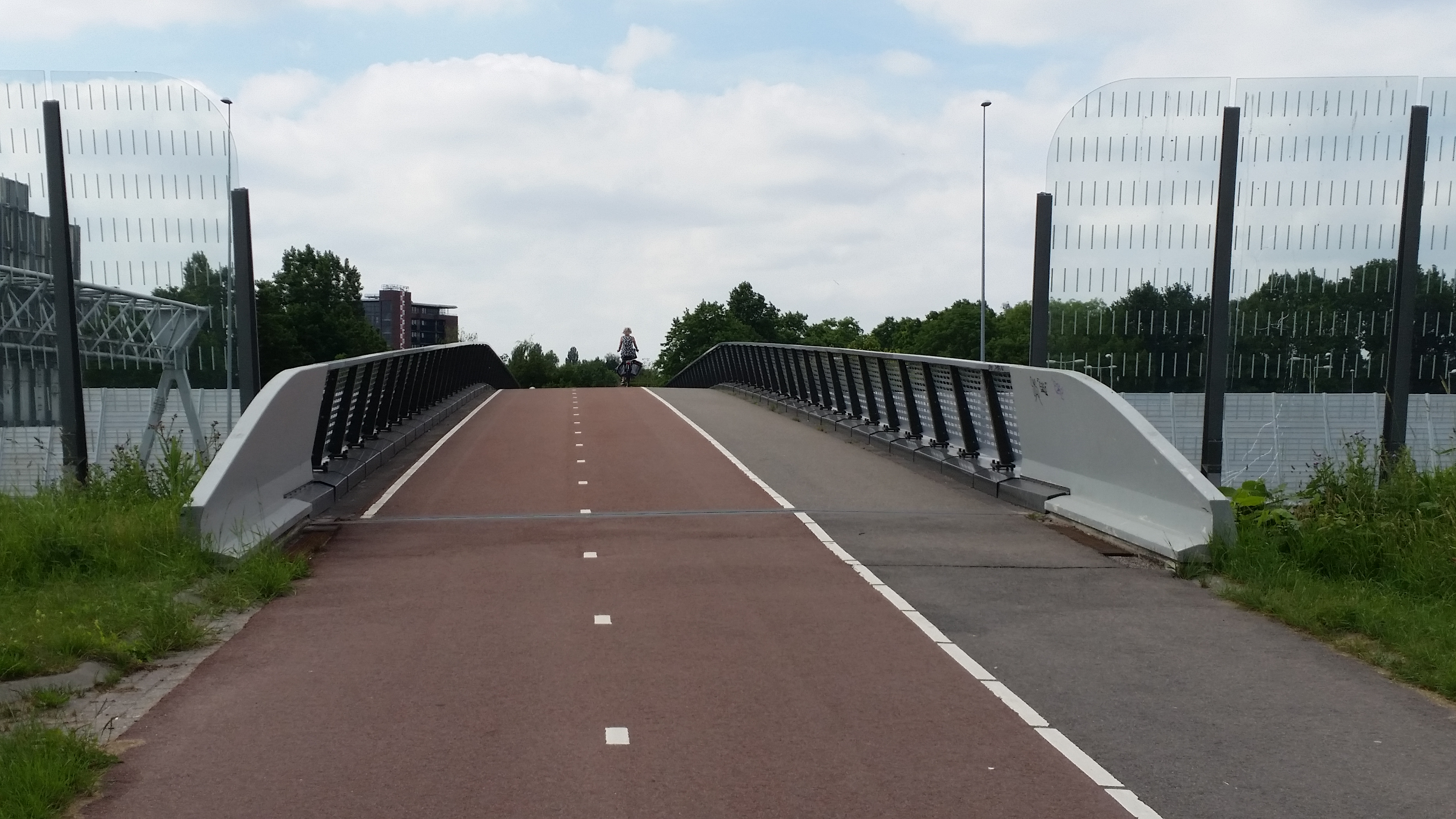 Overzicht van Brug 1906, Velibor Vasovićbrug